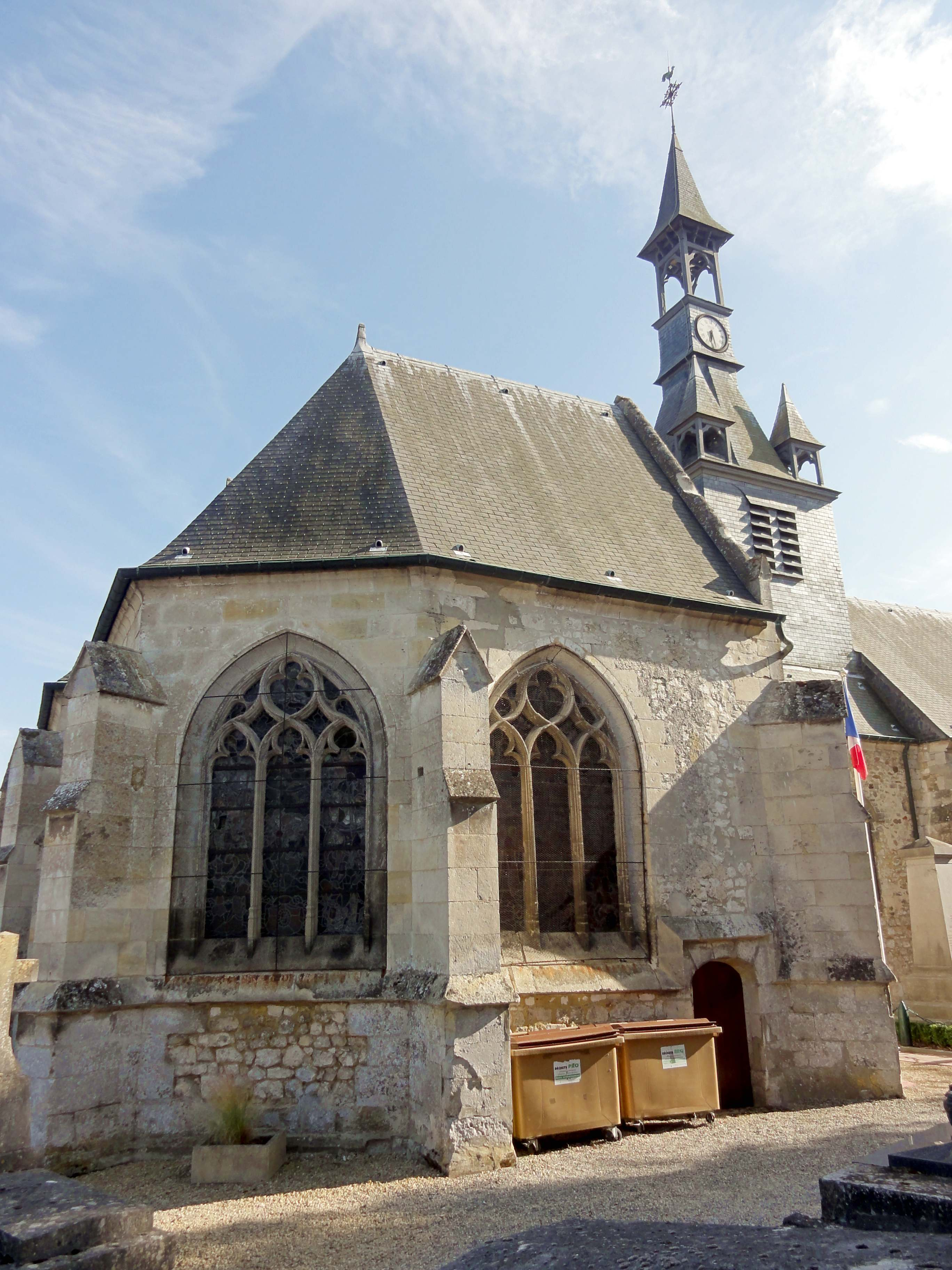 Église Saint-Pierre-et-Saint-Paul de Fitz-James (voir titre).